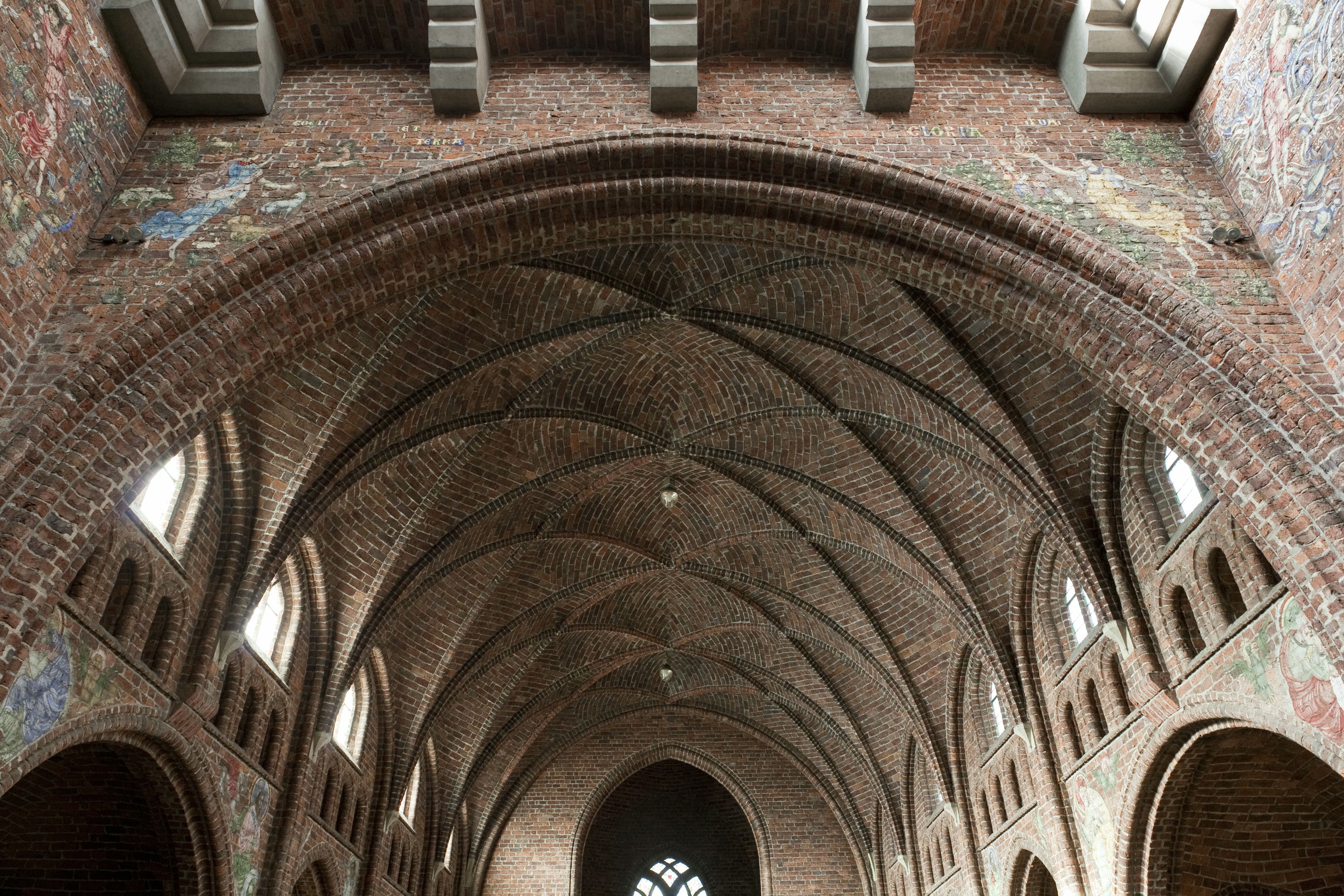 O.L. Vrouw ten Hemelopneming: Interieur, gewelf boven het schip, gezien vanaf het altaar